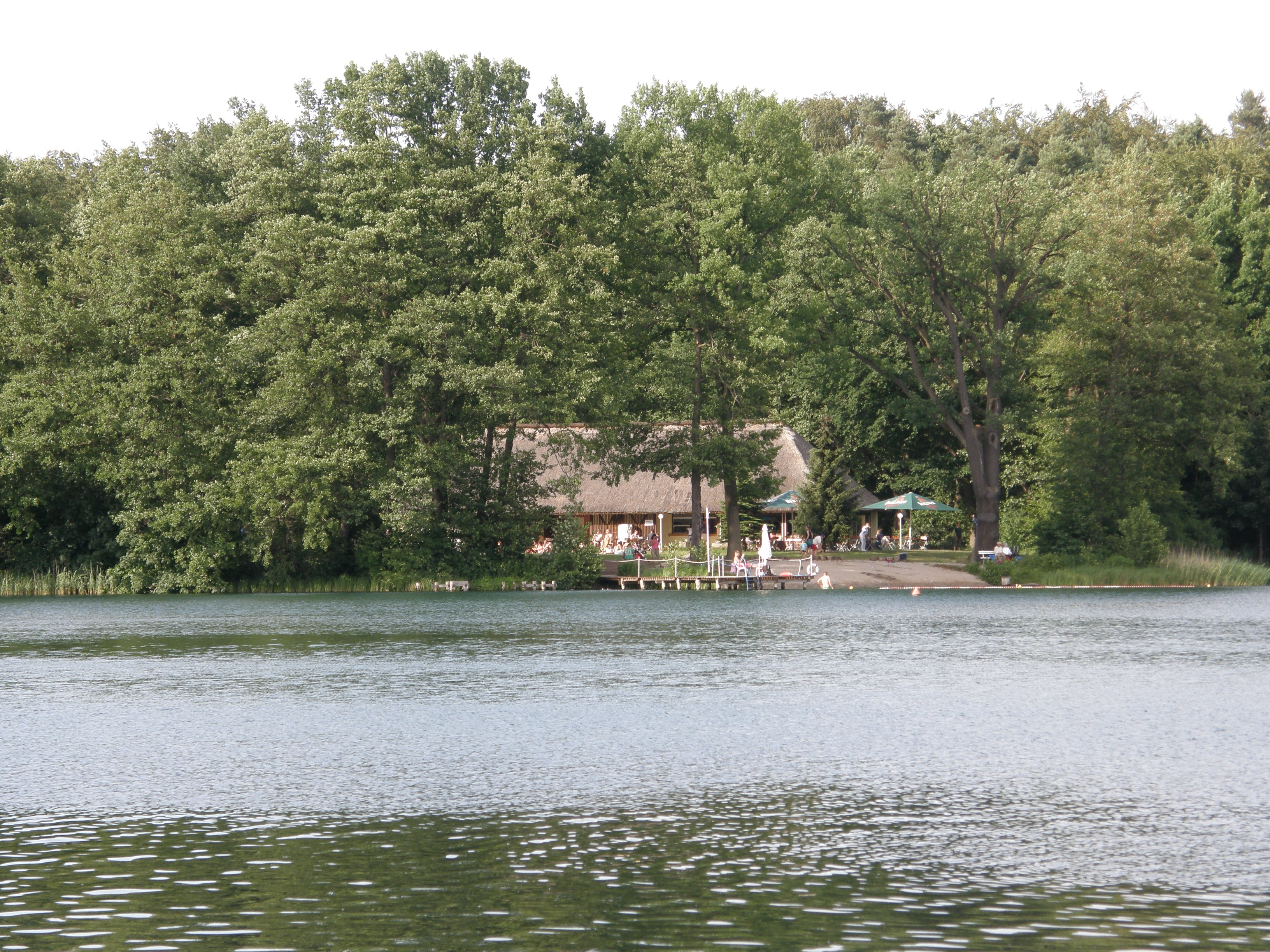 Obersee bei Lanke (Wandlitz), Badeanstalt